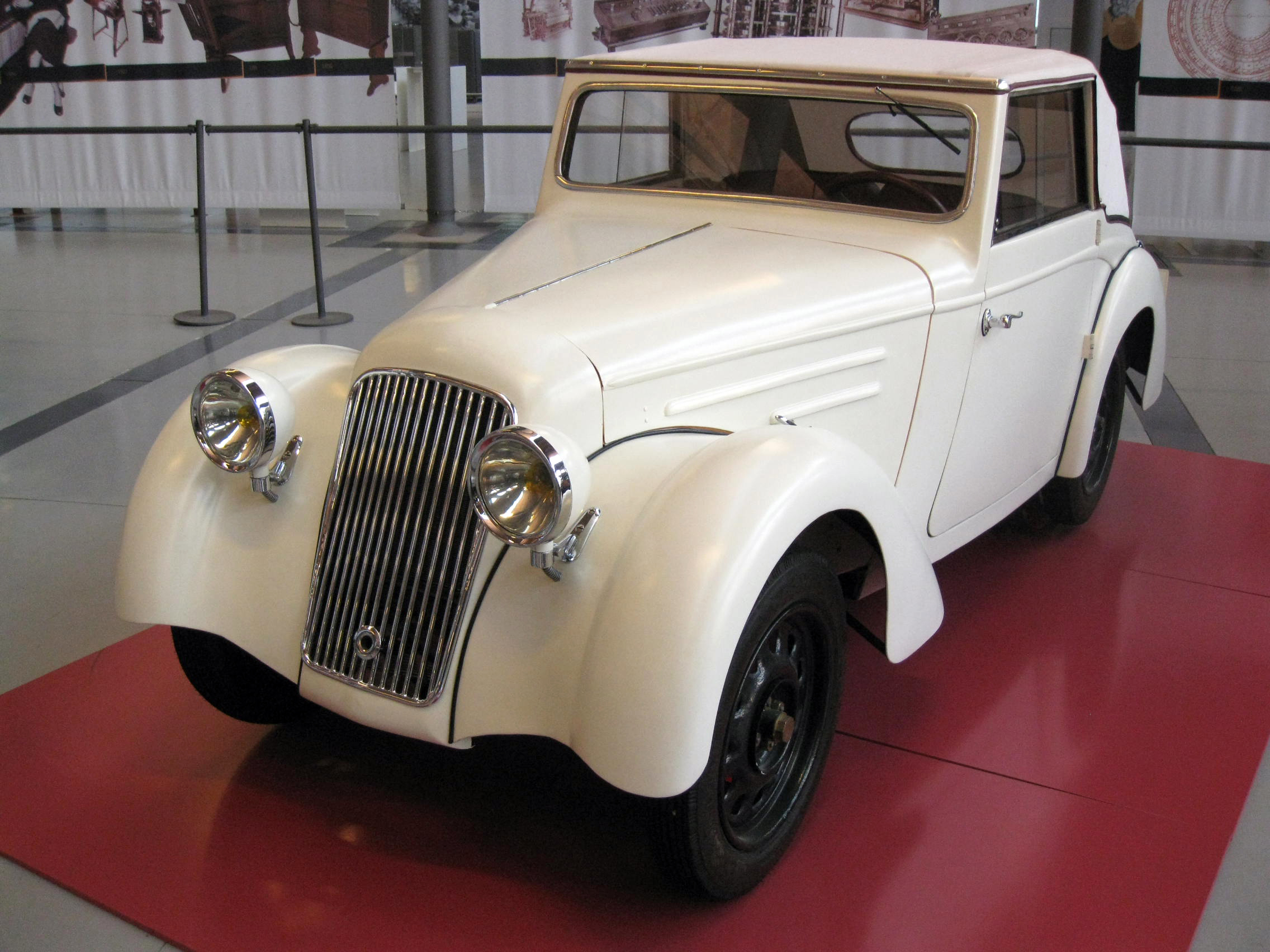 Fàbrica Aymerich, Amat i Jover (Terrassa) Object location41° 33′ 54.49″ N, 2° 00′ 28.14″ E